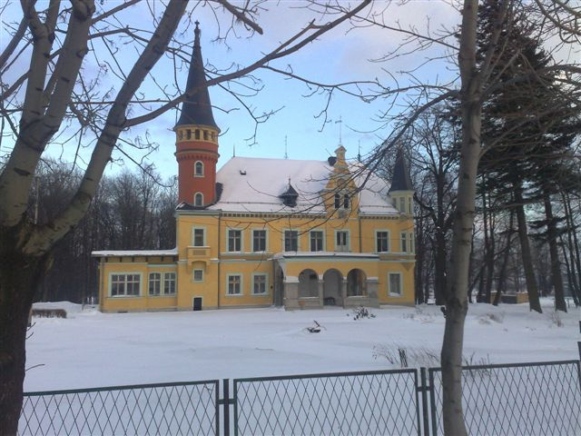 Jodłownik 12 - pałac (zabytek nr A/4192/935/Wł)